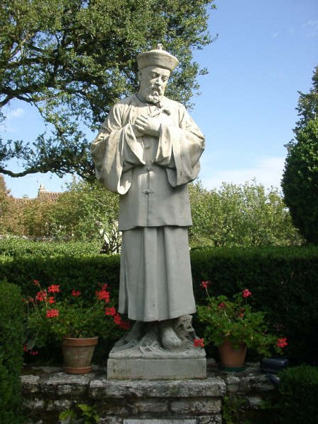 statue de Jean-Gabriel Perboyre